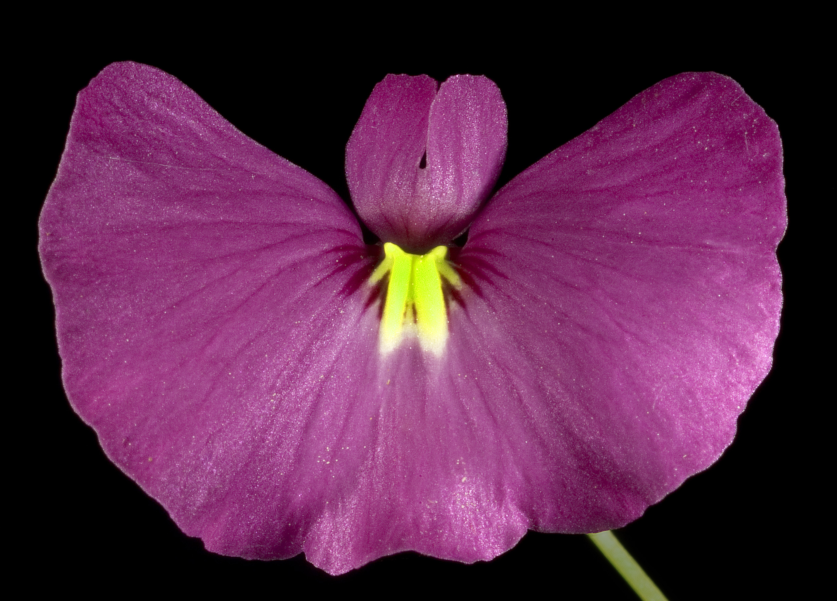 KRT3881